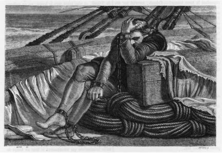 Colón encadenado en el barco La Gorda, tras ser arrestado por Francisco de Bobadilla en Santo Domingo